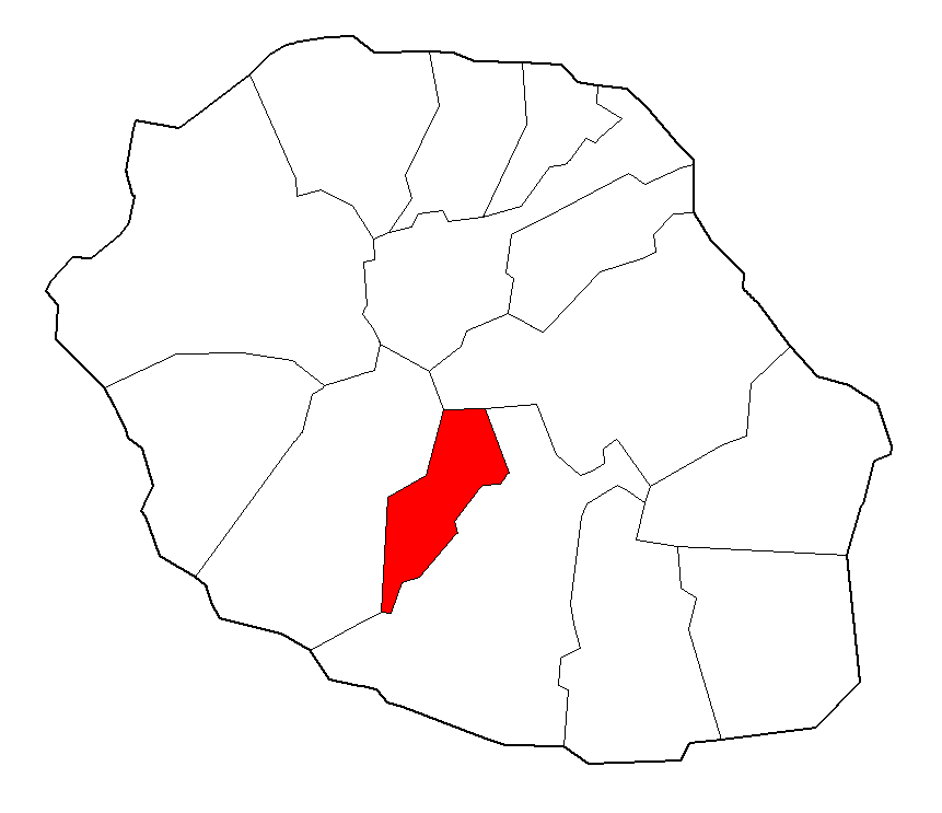 Carte de la Réunion présentant L'Entre-Deux lors de la création de la commune en 1982.